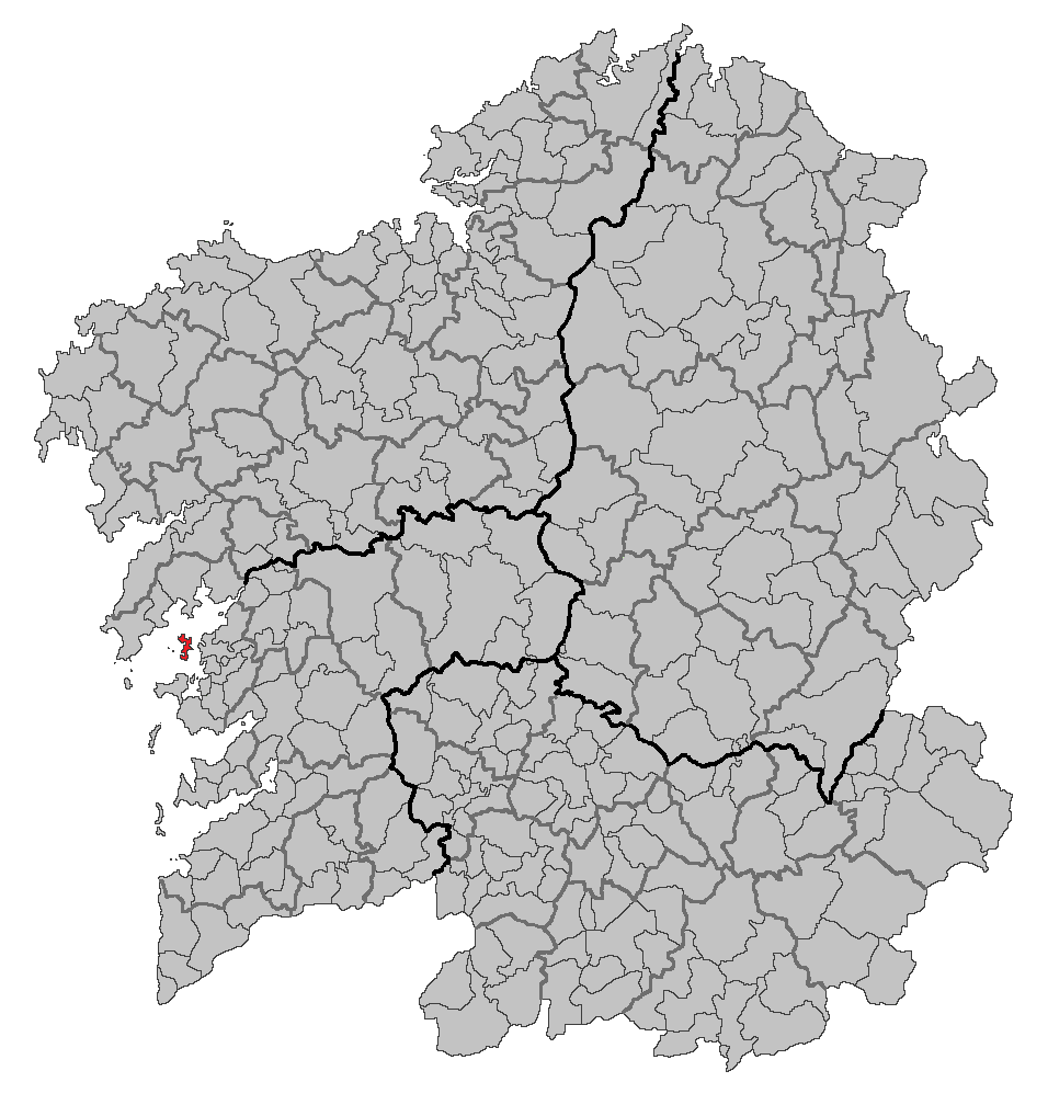 Mapa coa localización do concello de A Illa de Arousa.